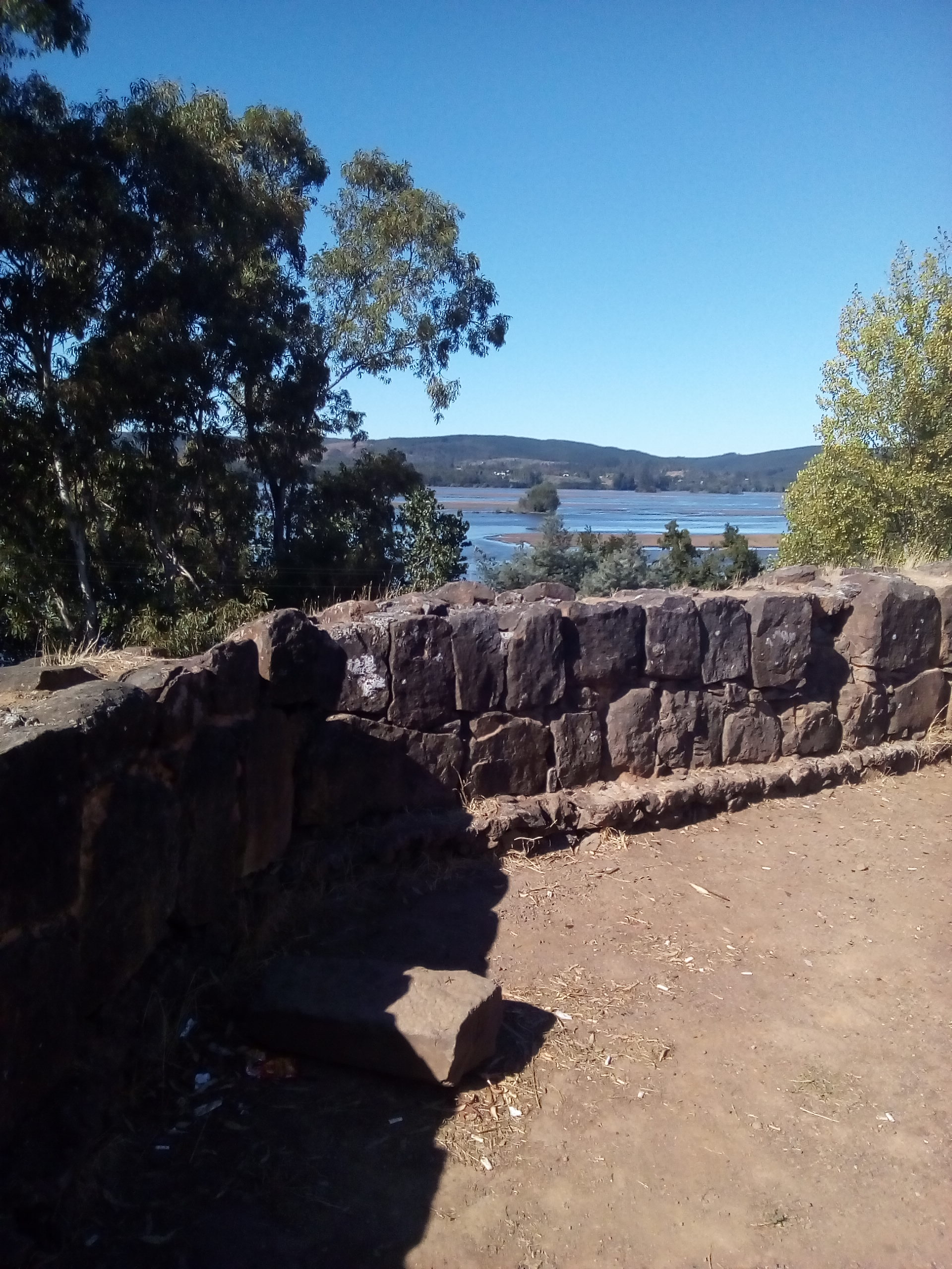 Distintas imágenes del Fuerte de Santa Juana y la laguna cercana.